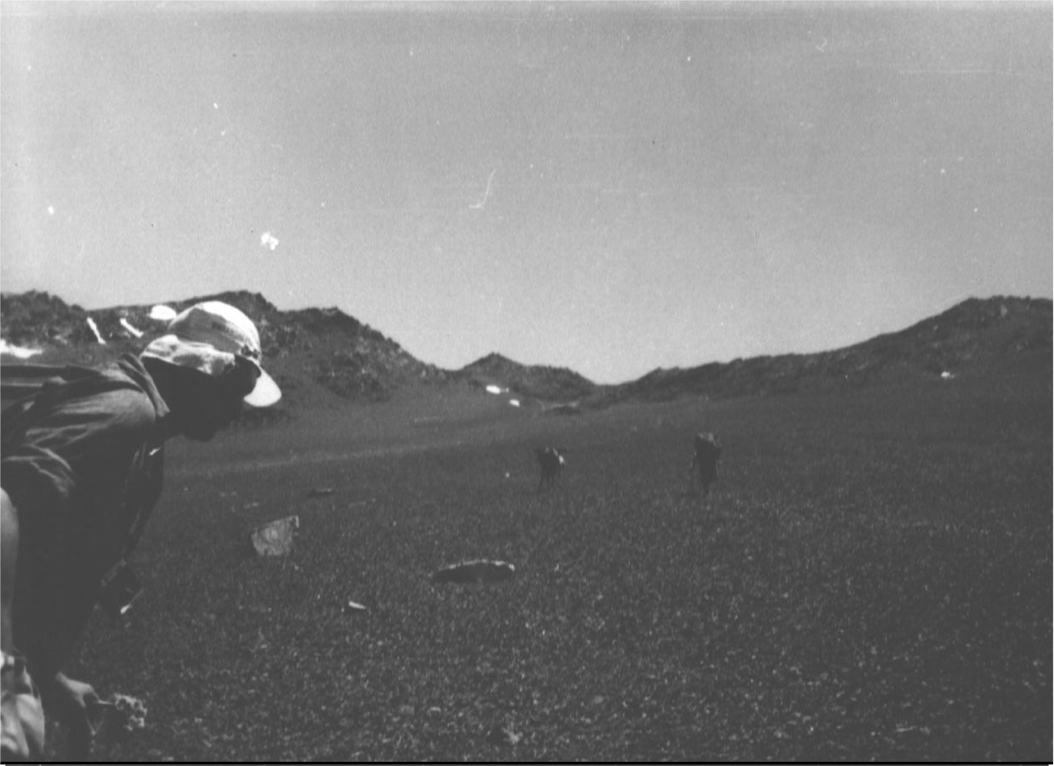 Фото